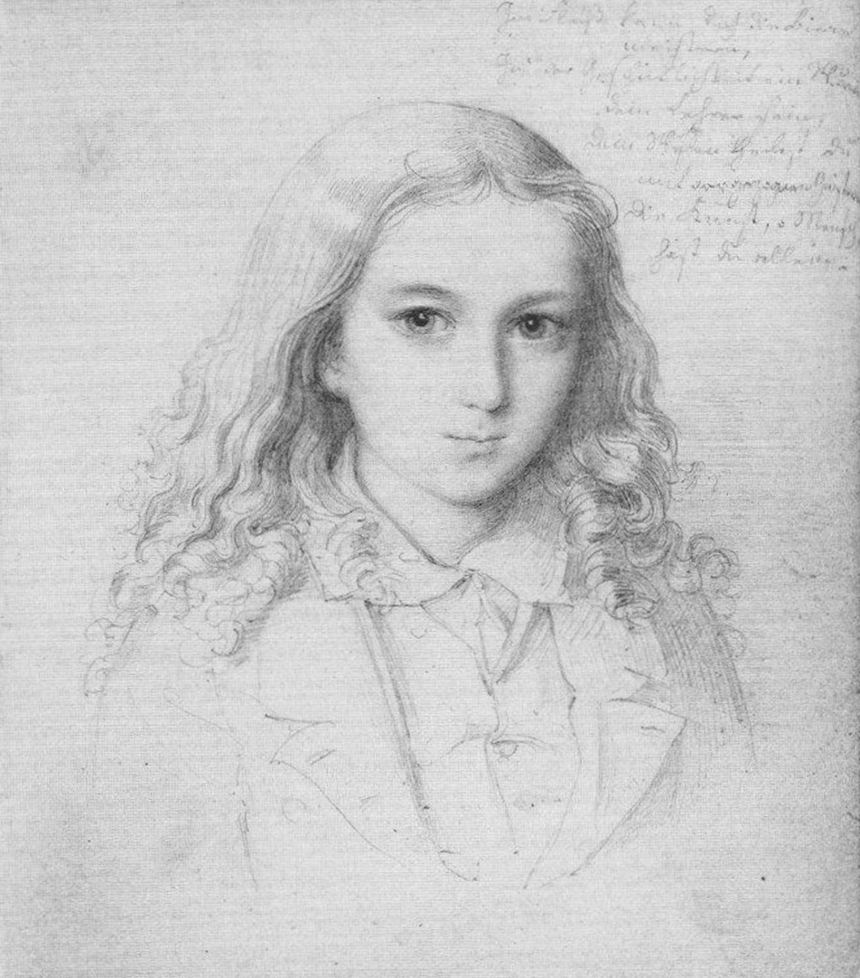 Young Mendelssohn (1809-1847)